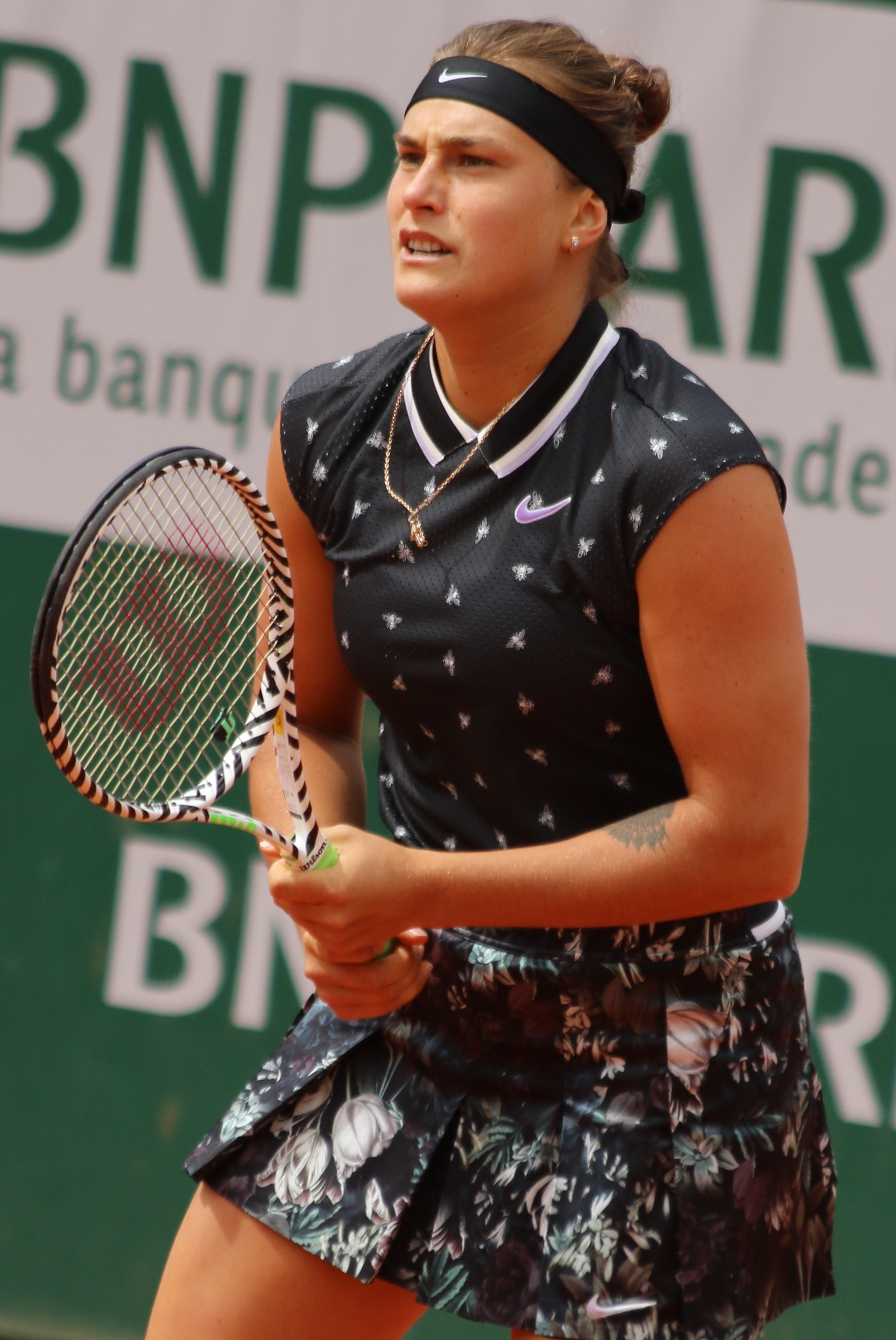 Sabalenka RG19 (5)